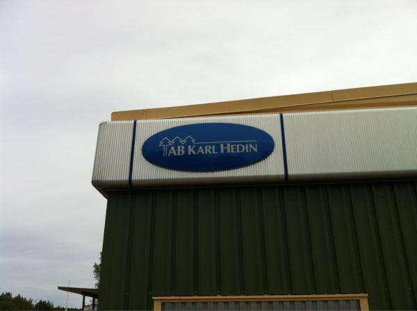 AB Karl Hedin butik i Hagfors